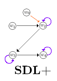 SDL+ frame